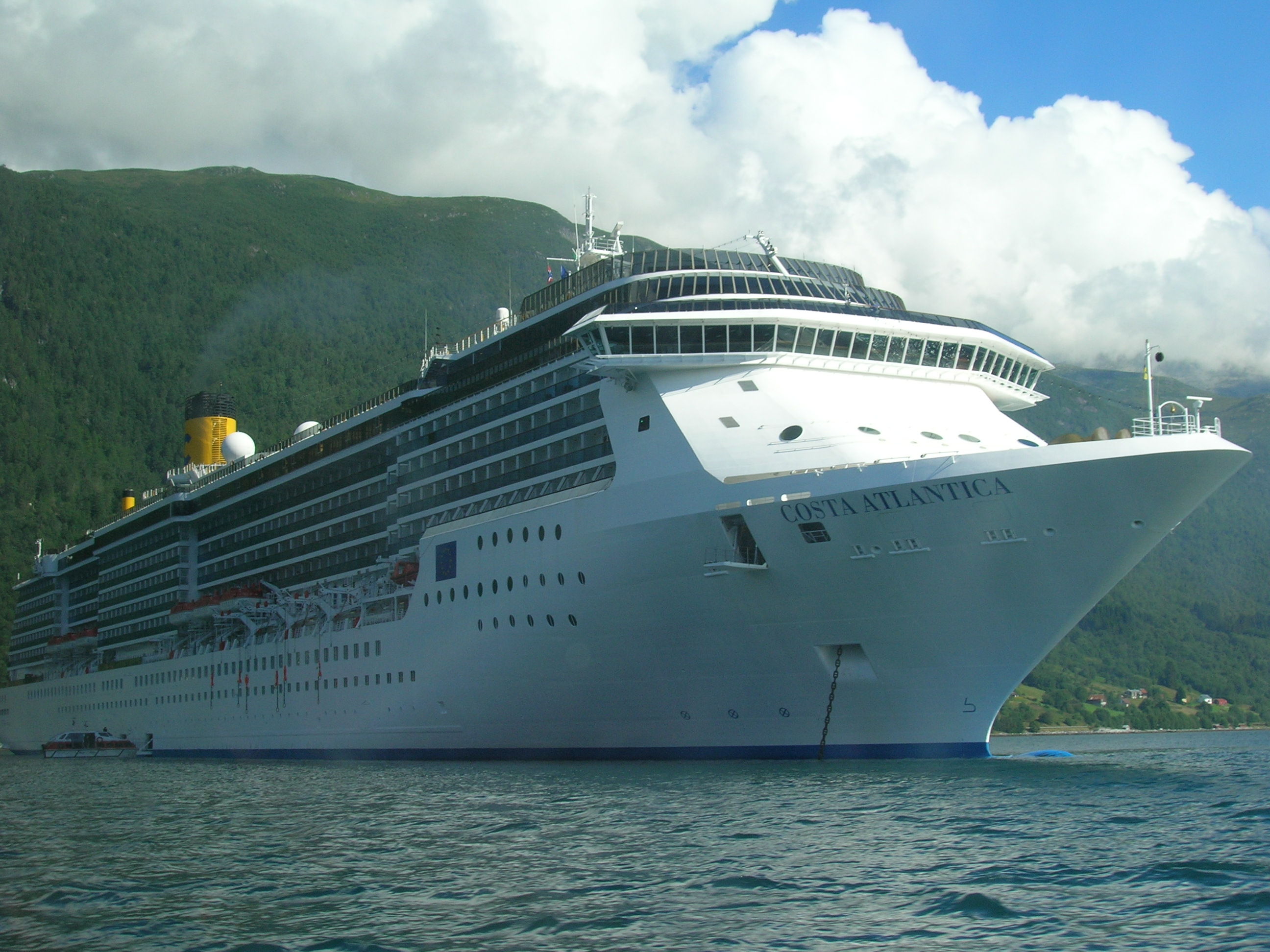 Costa Atlantica bei Andalsnes in Norwegen (August 2006)